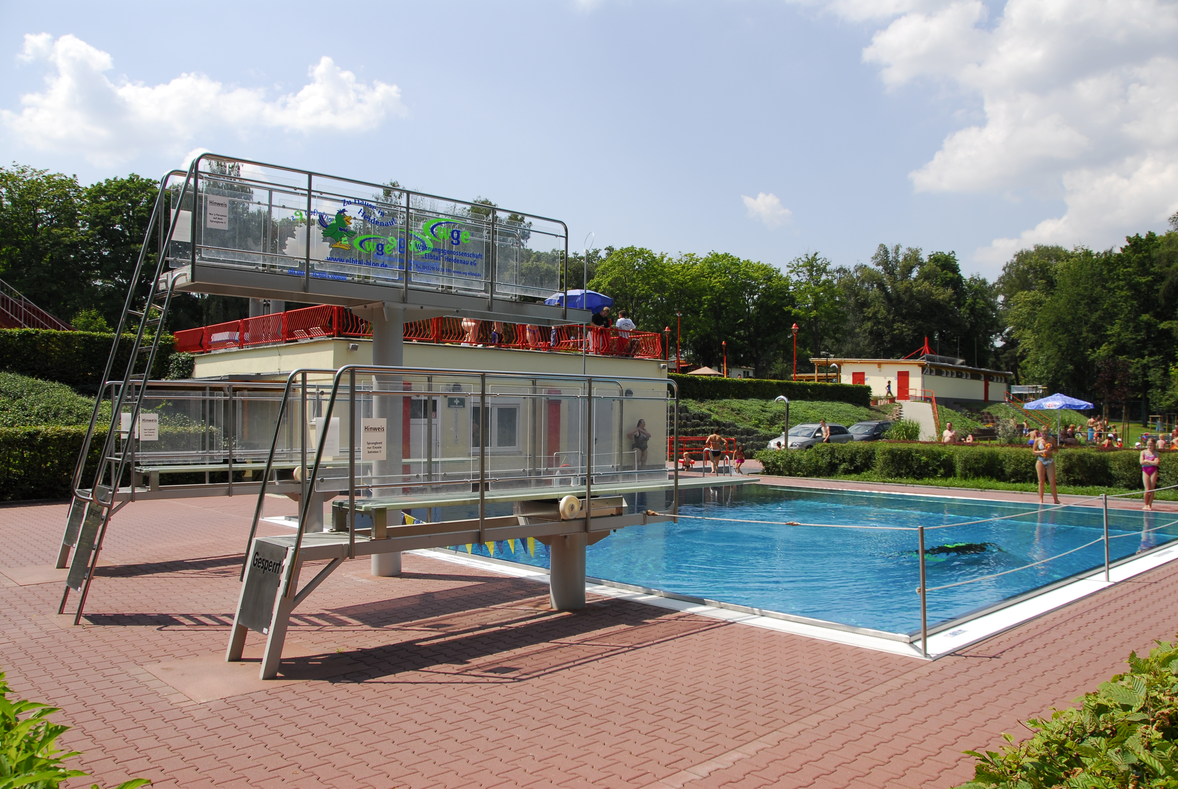 Springerbereich mit 1 Sprungbretter und 3 m Plattform